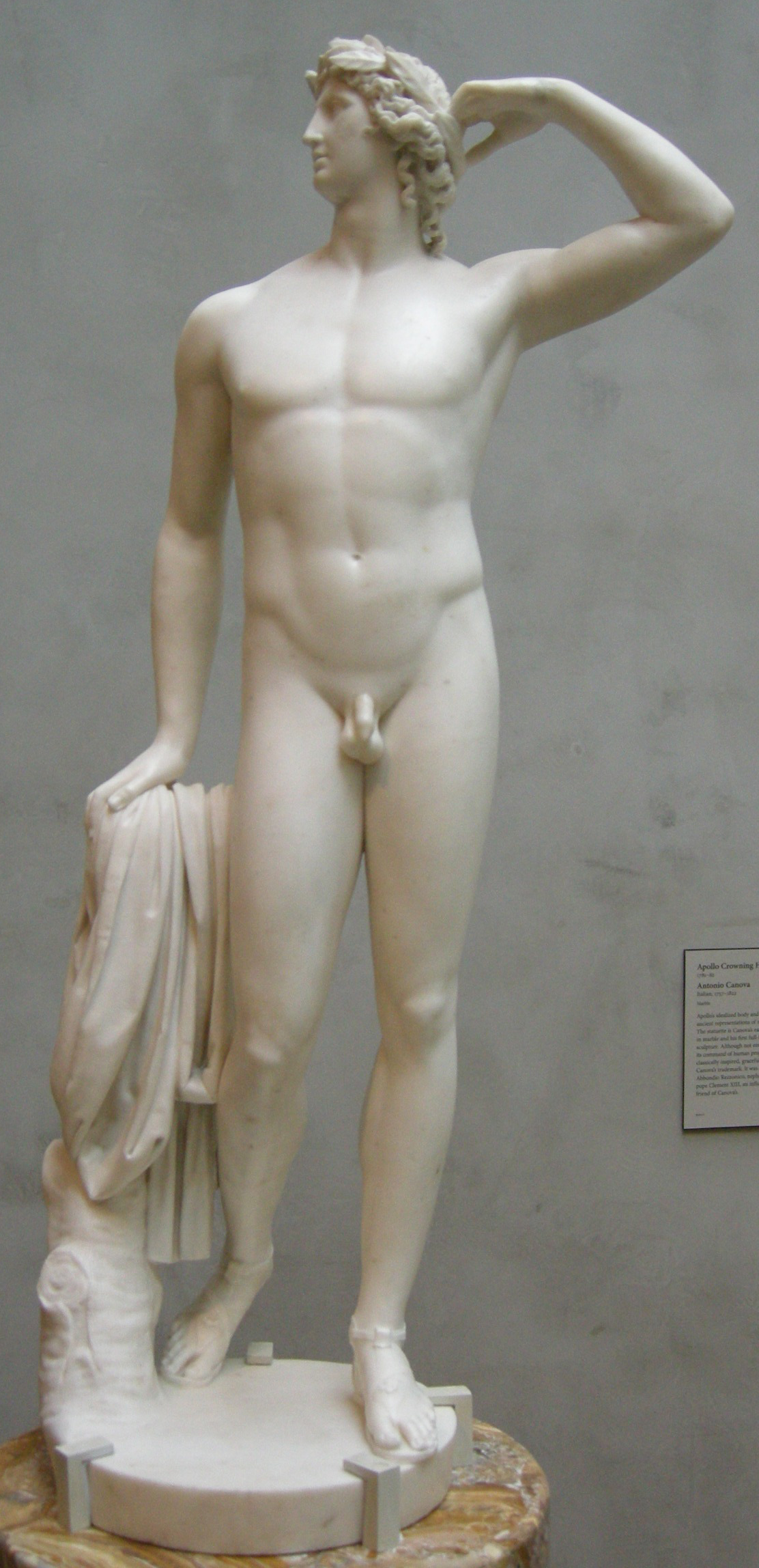 Antonio canova, apollo che si incorona, 1781-82